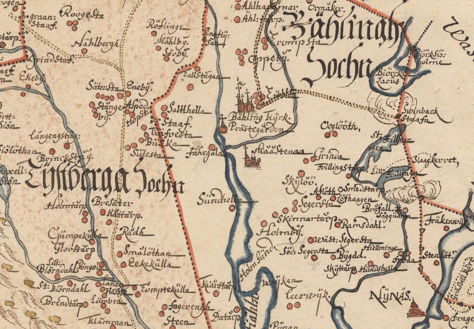 Del av Karta över Tystberga och Bälinge socken, Södermanland visande Måstena och Bälinge kyrka